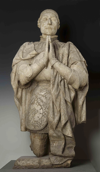 Estatua orante de Pedro I de Castilla (Baja Edad Media). Número de inventario: 50234.